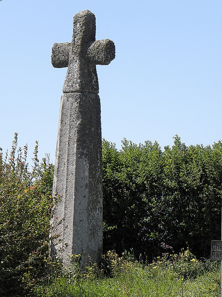 Stèle christianisée et inscrite à l'inventaire supplémentaire des monuments historiques dite Kroaz-Méan en Plougoulm (29).